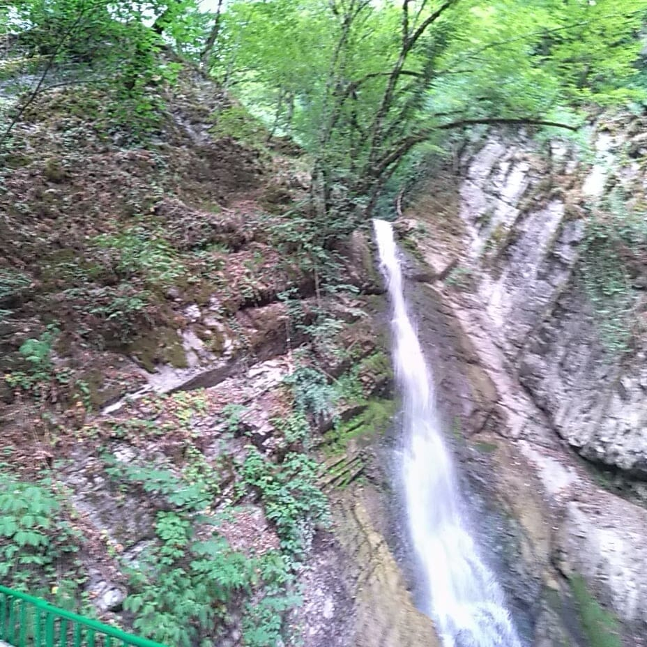 Водопад "7 Красавиц" расположенный в Азербайджане